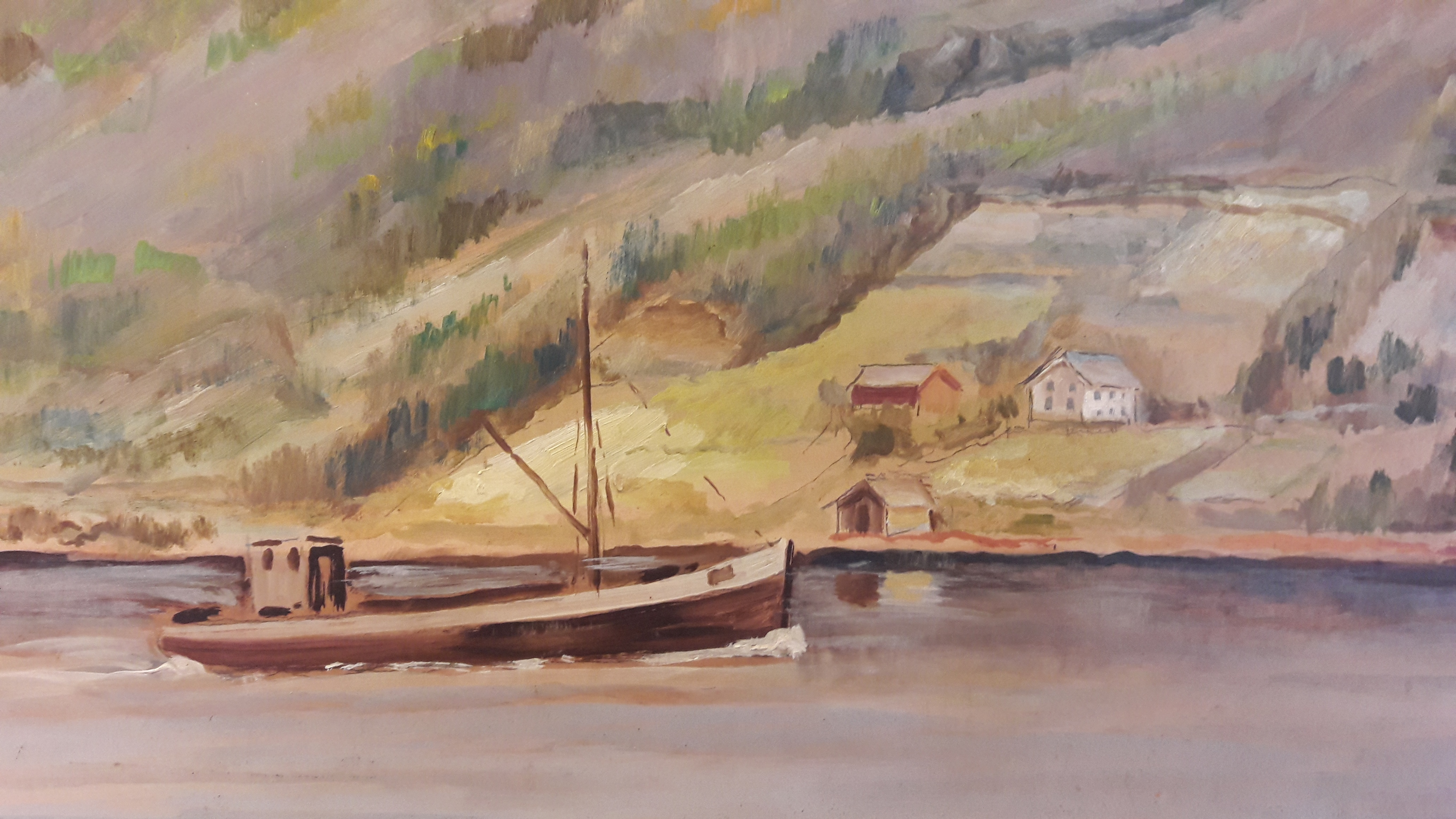 Terje Viken med Øyra indre Hjartholm i bakgrunnen.